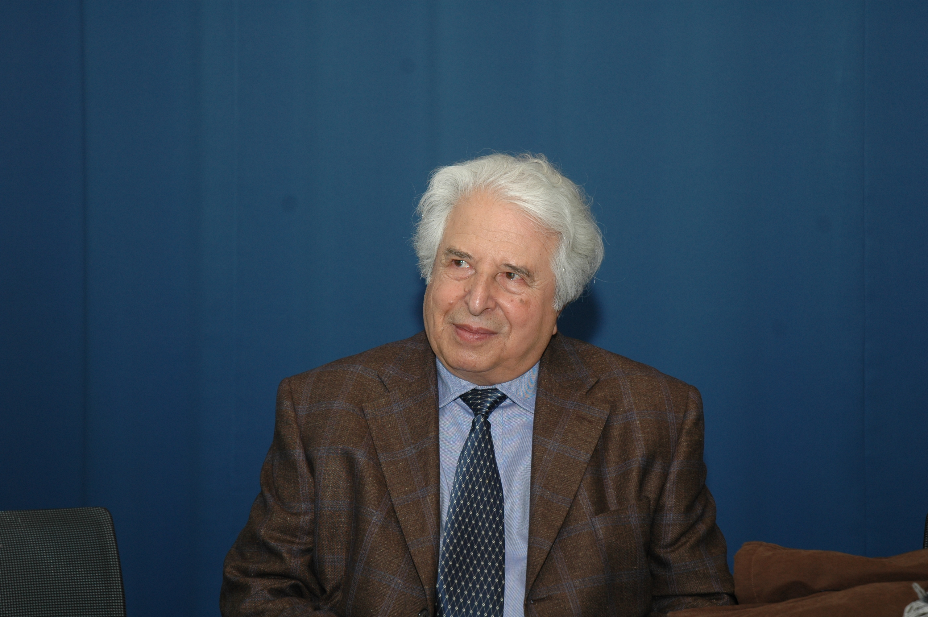 Saul Friedender, israelischer Historiker und Autor bei einem Interview am 8. Dezember 2010 in Heidelberg